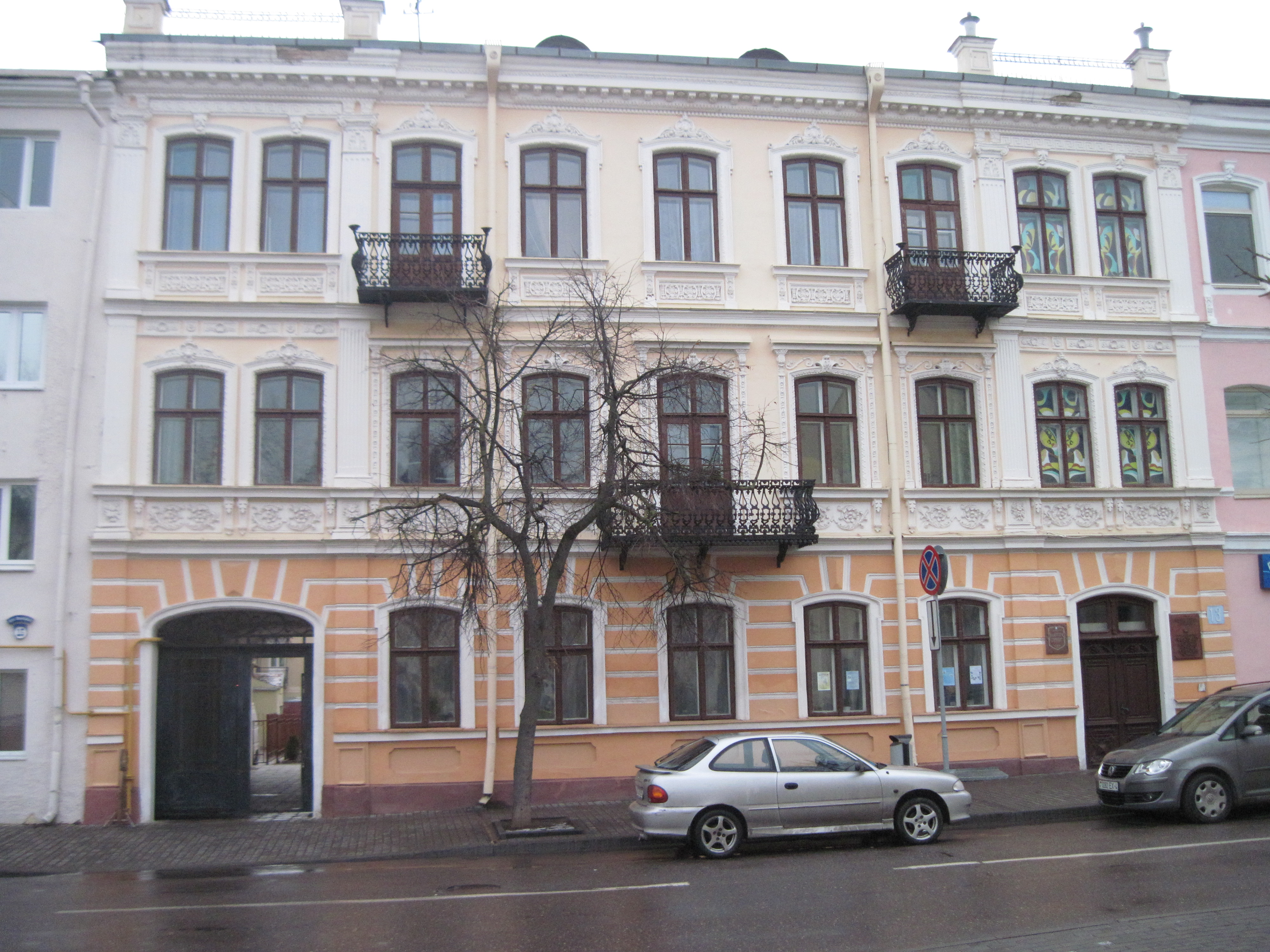 Беларуская (тарашкевіца): Будынак па вуліцы Замкавая, 13 у Гродна